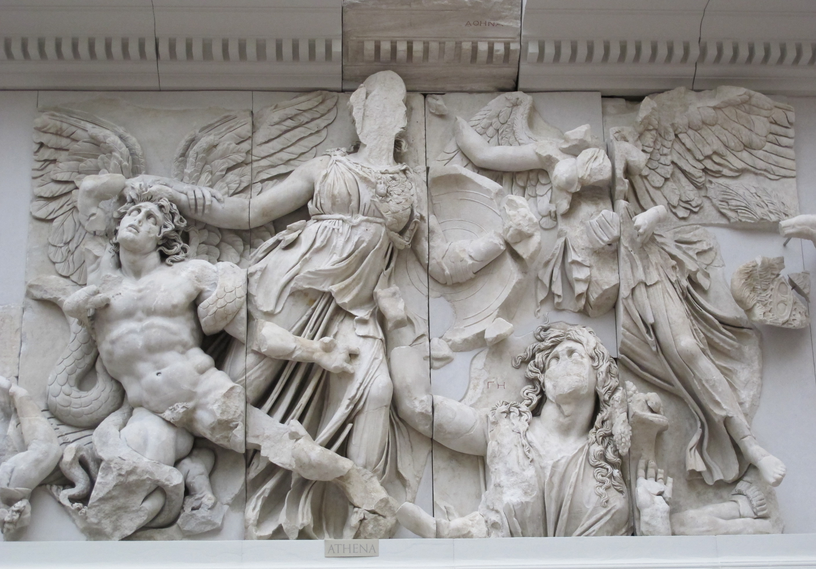 Fregio della gigantomachia